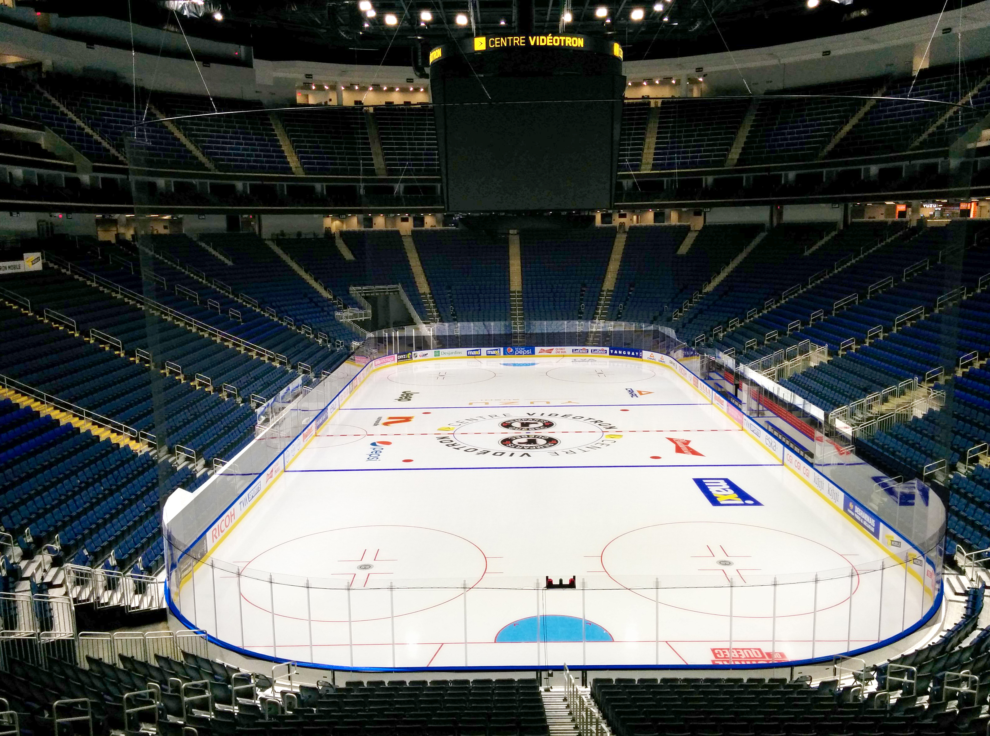 Vue d'ensemble de la patinoire du Centre Vidéotron.